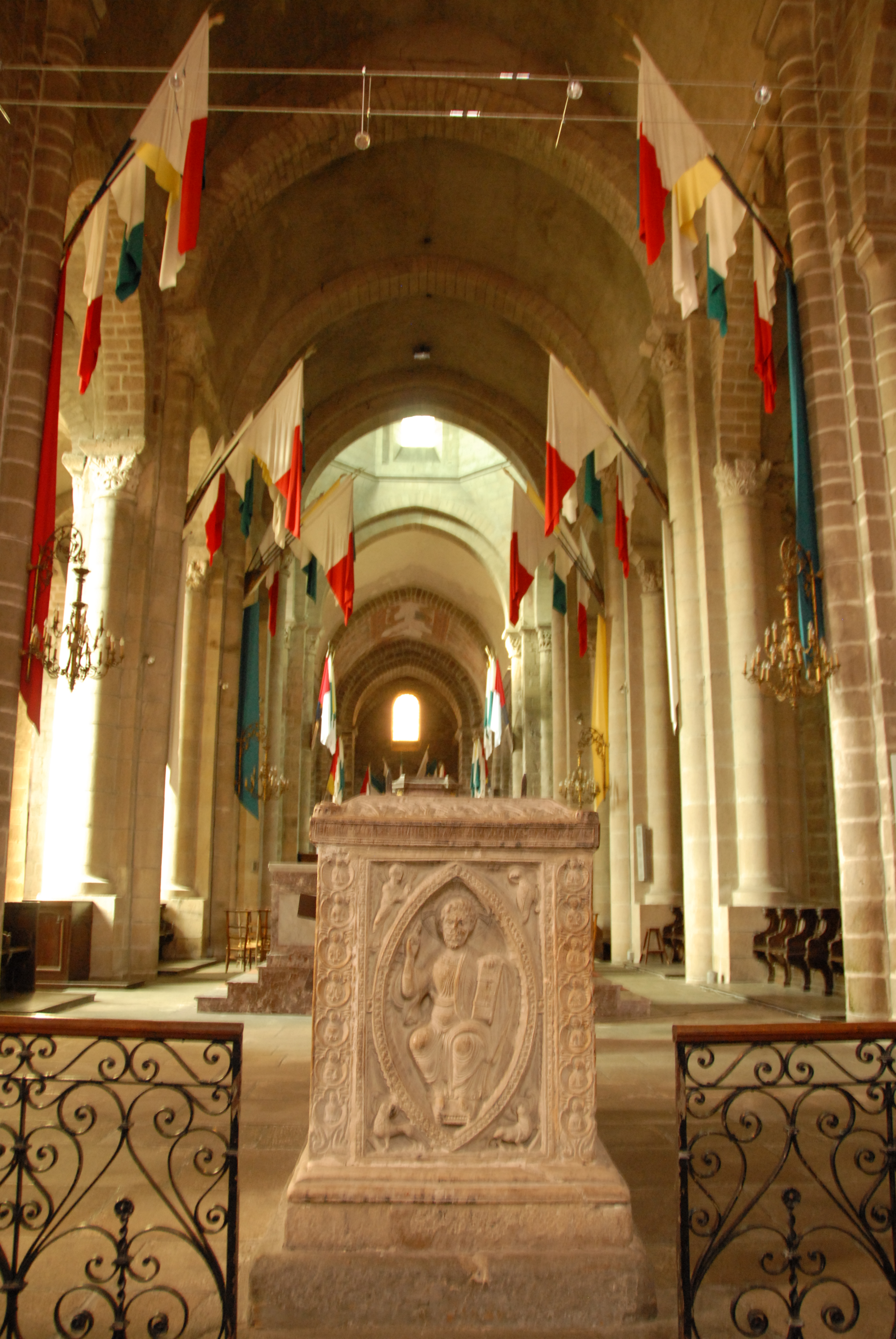 ST-junien, Chor mit Sarkophag aus Joch 5